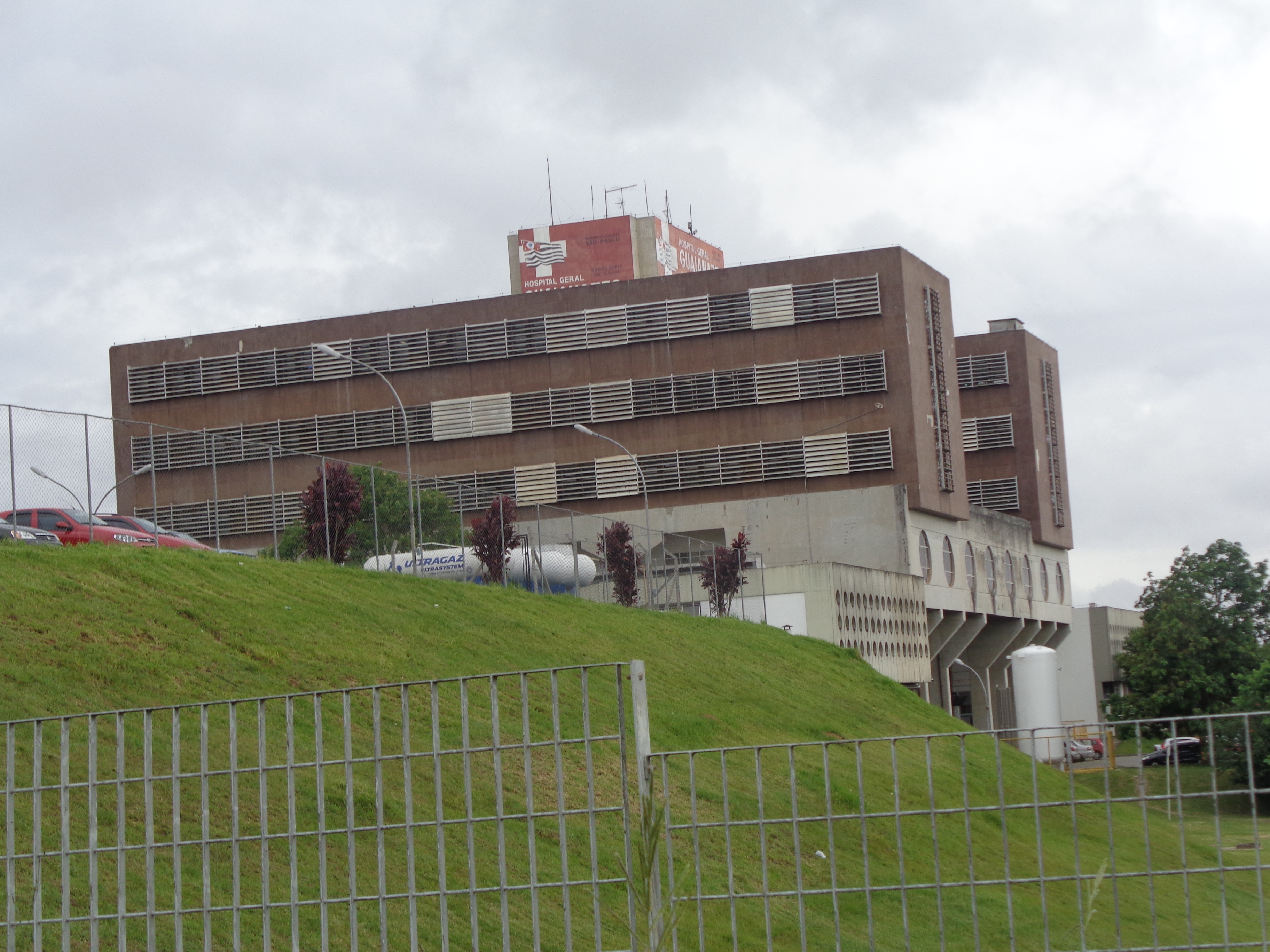 Hospital Geral Jesus Teixeira Costa